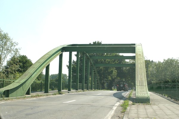 Vierendeelbréck zu Ooidonk iwer d'Leie.